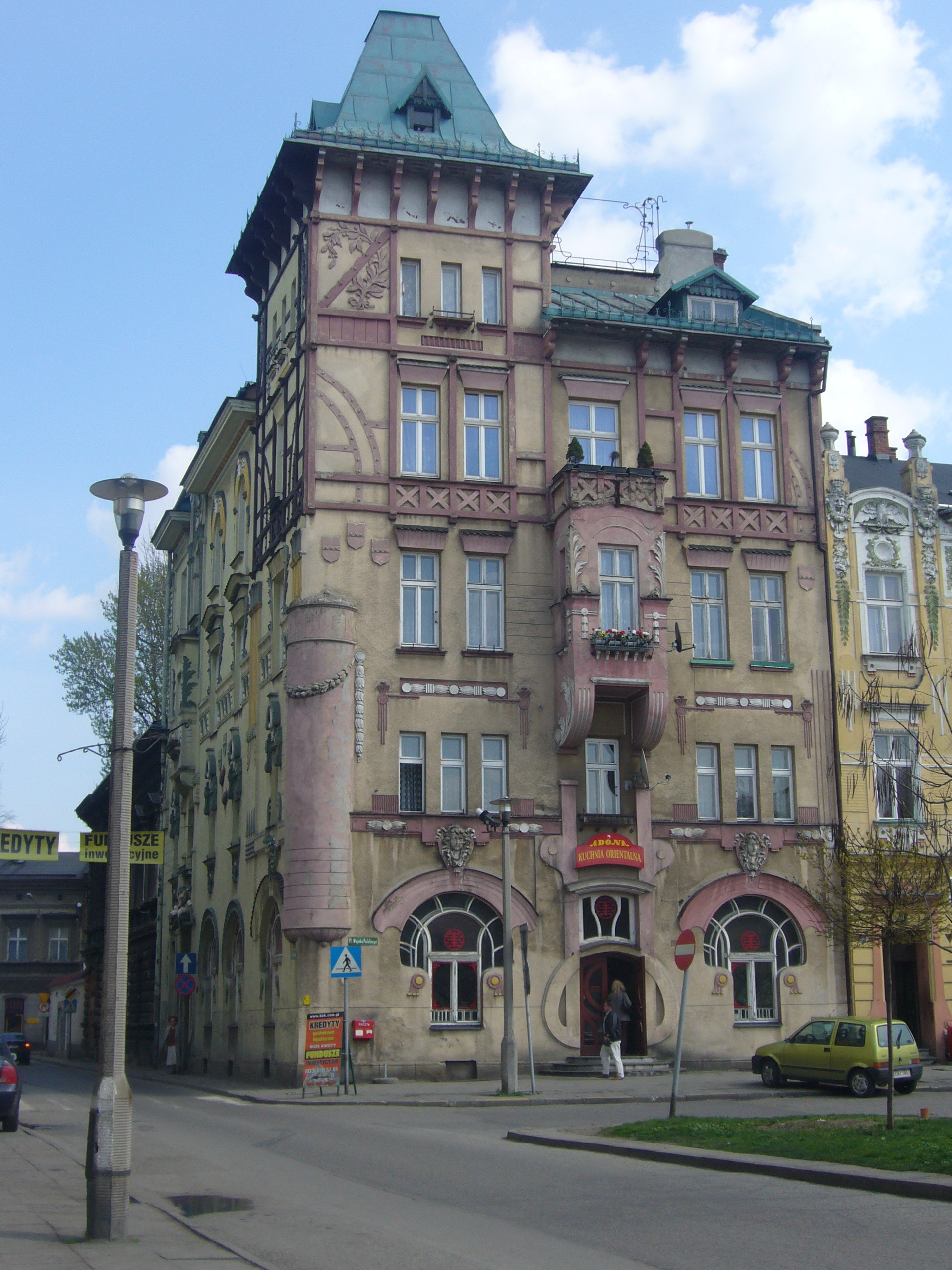 Kamienica Pod Żabami w Bielsku-Białej